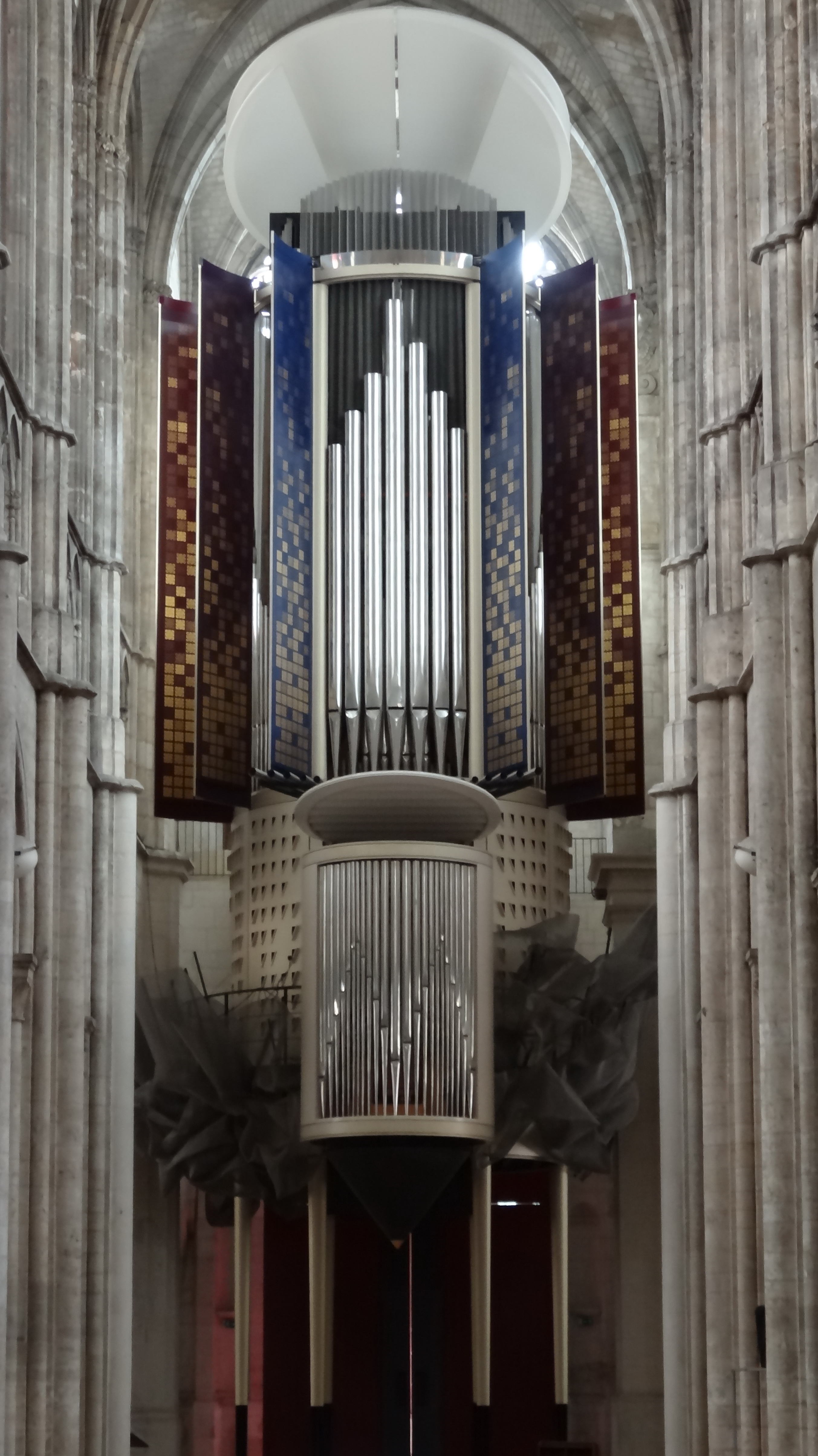 Orgue de la Cathédrale Notre-Dame d'Evreux (Normandie)